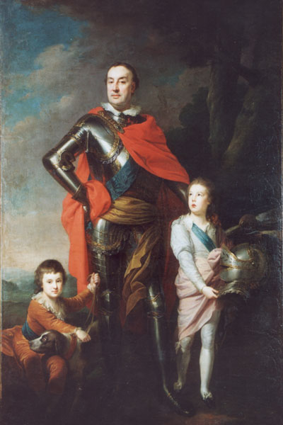 Franciszek Ksawery Branicki (1730-1819) and his sons Aleksander (1780-1798) and Władysław (1783–1843).